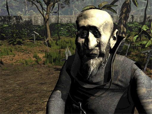 Capture d'écran du jeu vidéo L'Amerzone (1999), développé et édité par Microïds.